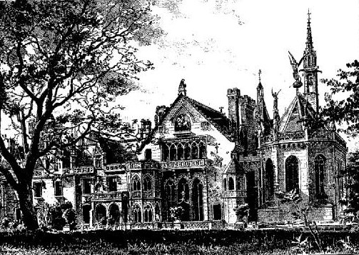 Concarneau : le château de Keriolet vers 1880 (dessin d'après une photographie de M. H. Duclos)